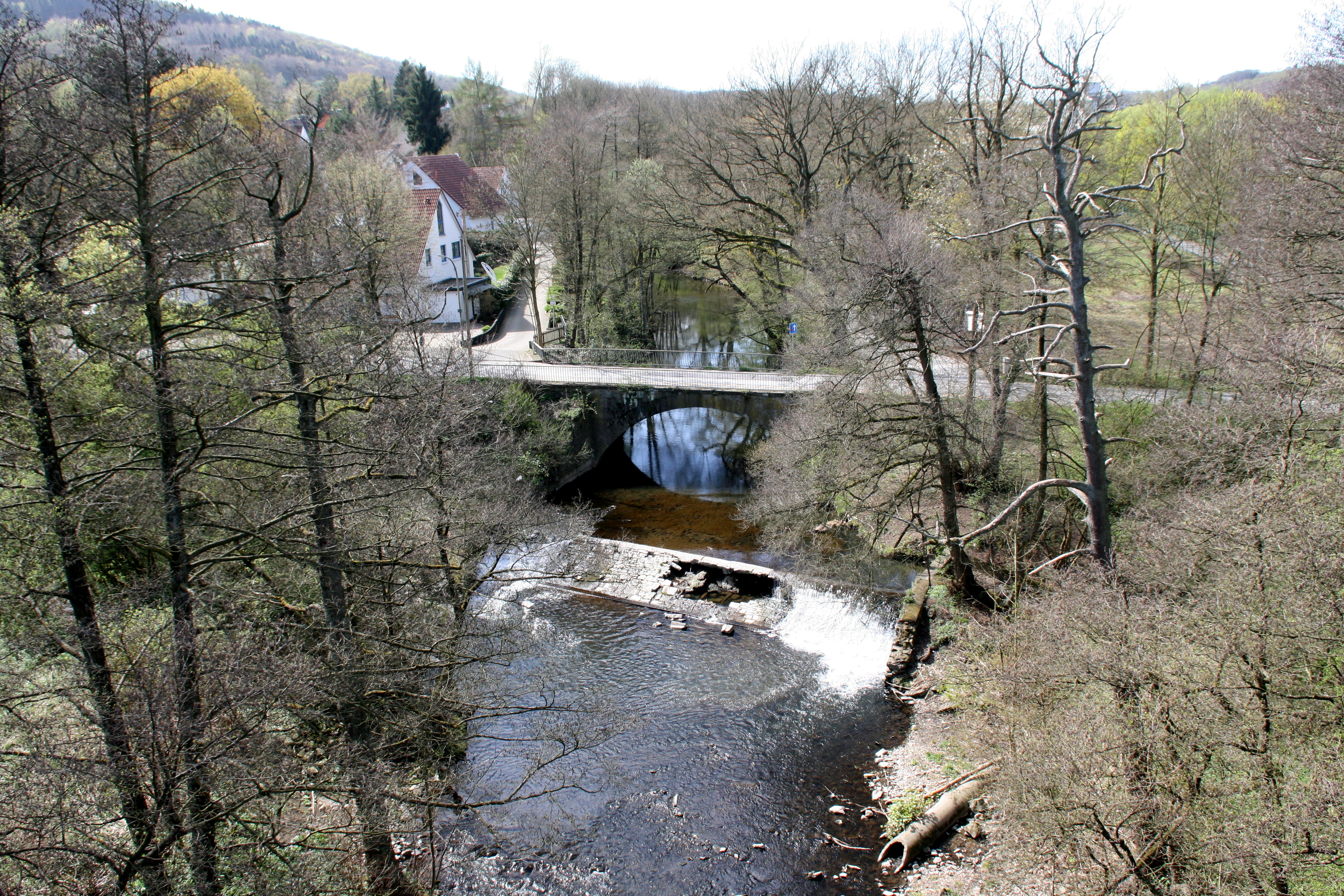 Blick von der Talbrücke Rocholz auf Rocholzallee und Ennepe in Gevelsberg